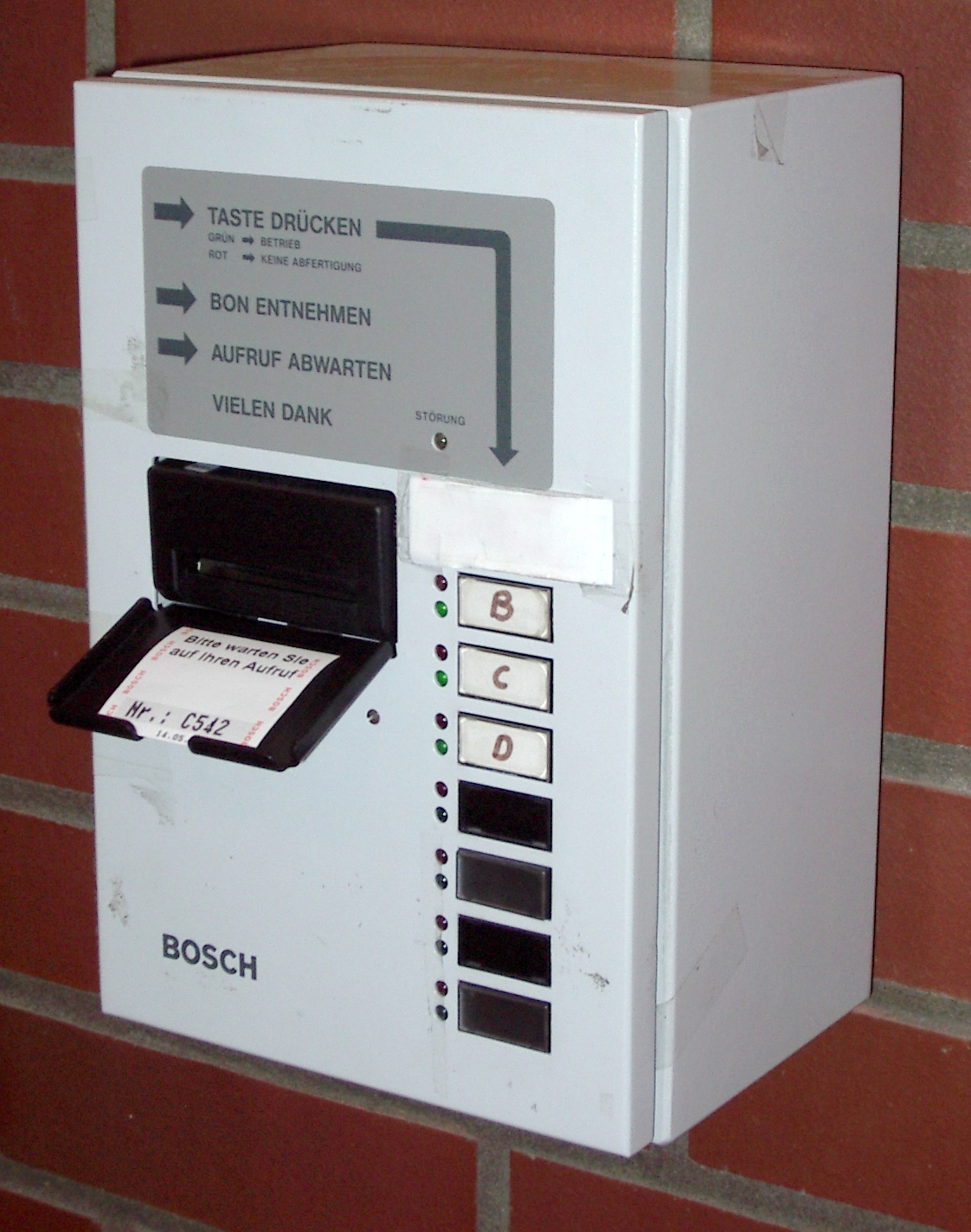 Wartemarkendrucker einer Behörde